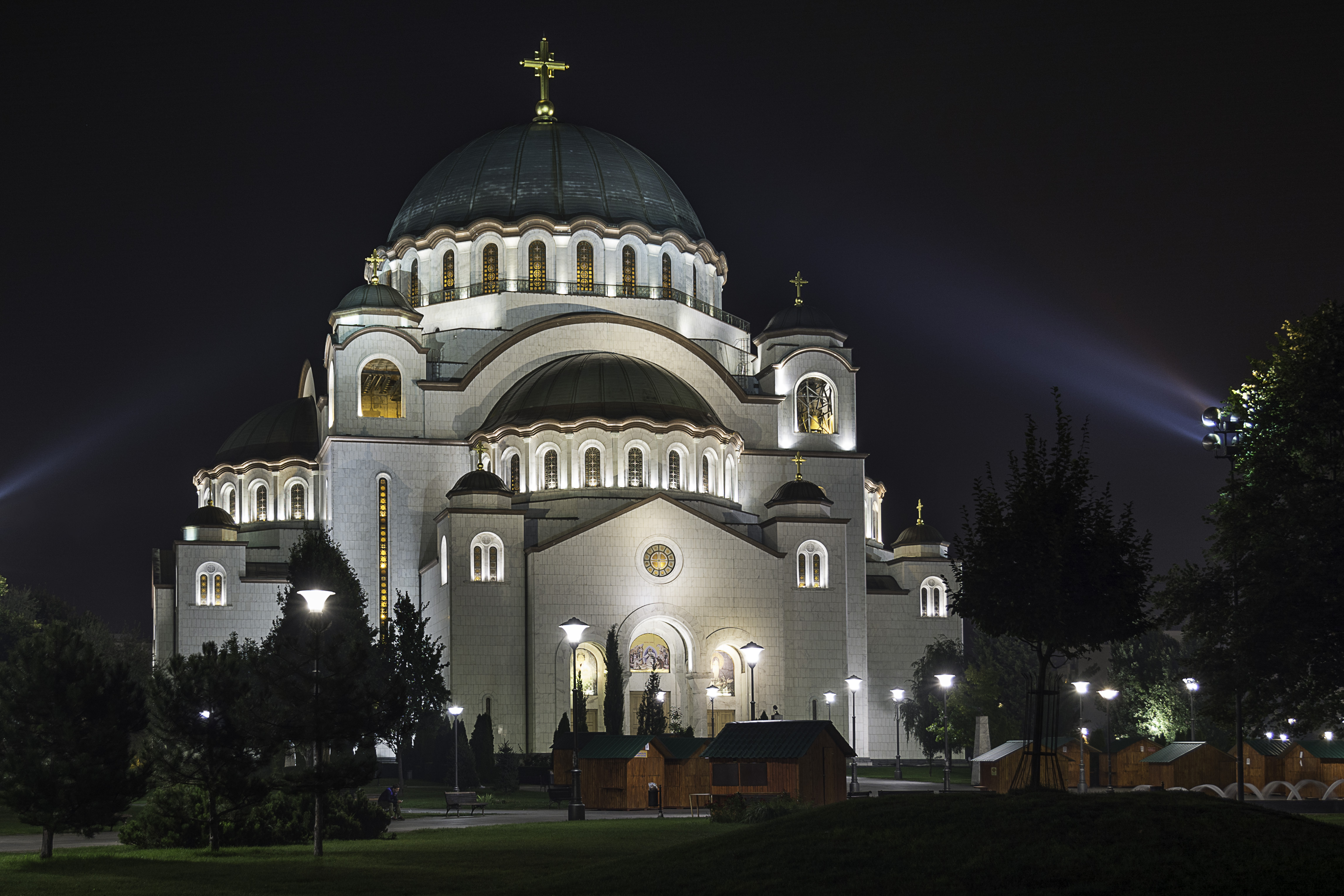 Храм Светог Саве, Београд (Cathedral of Saint Sava)